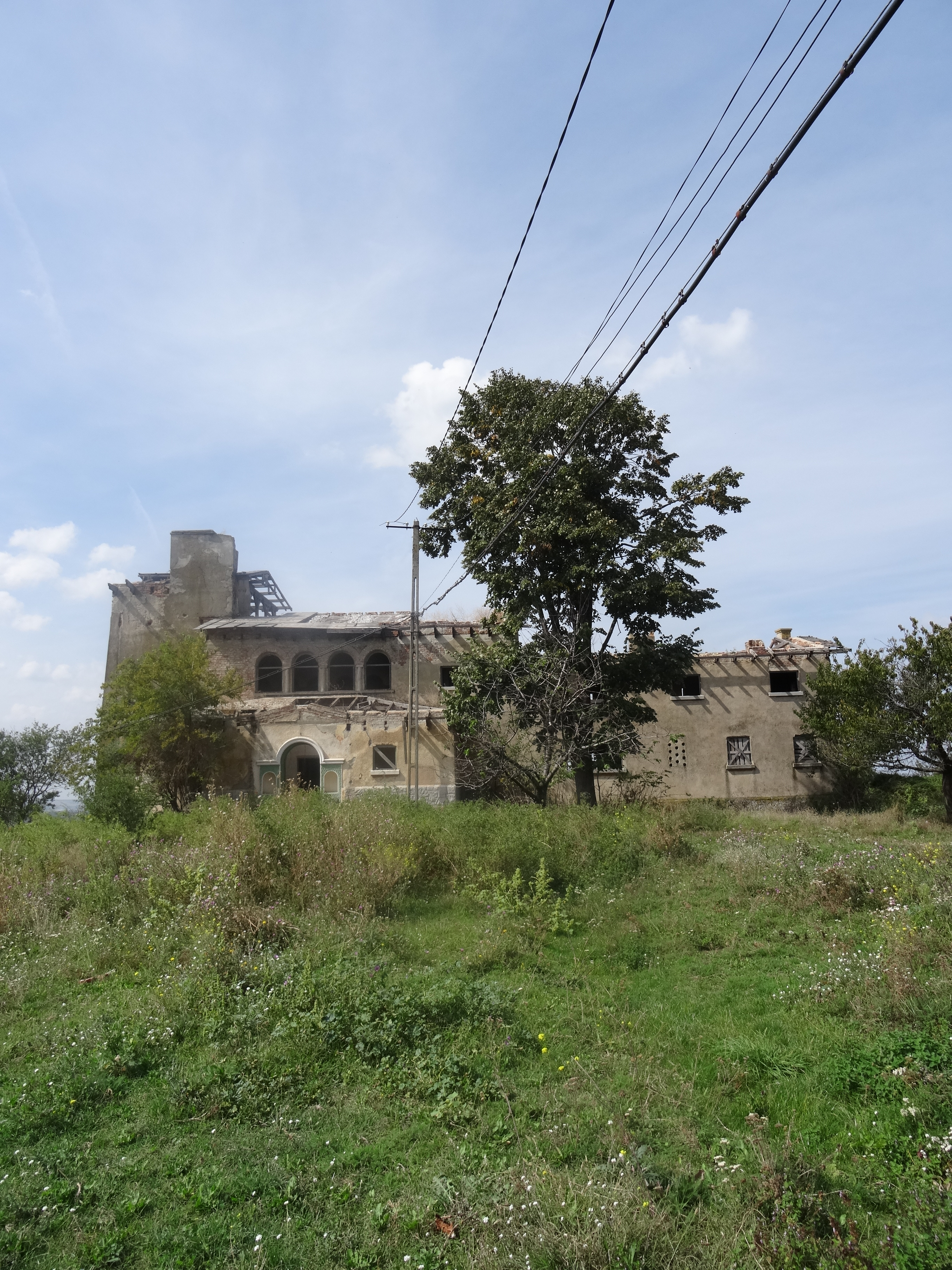 Vedere Est